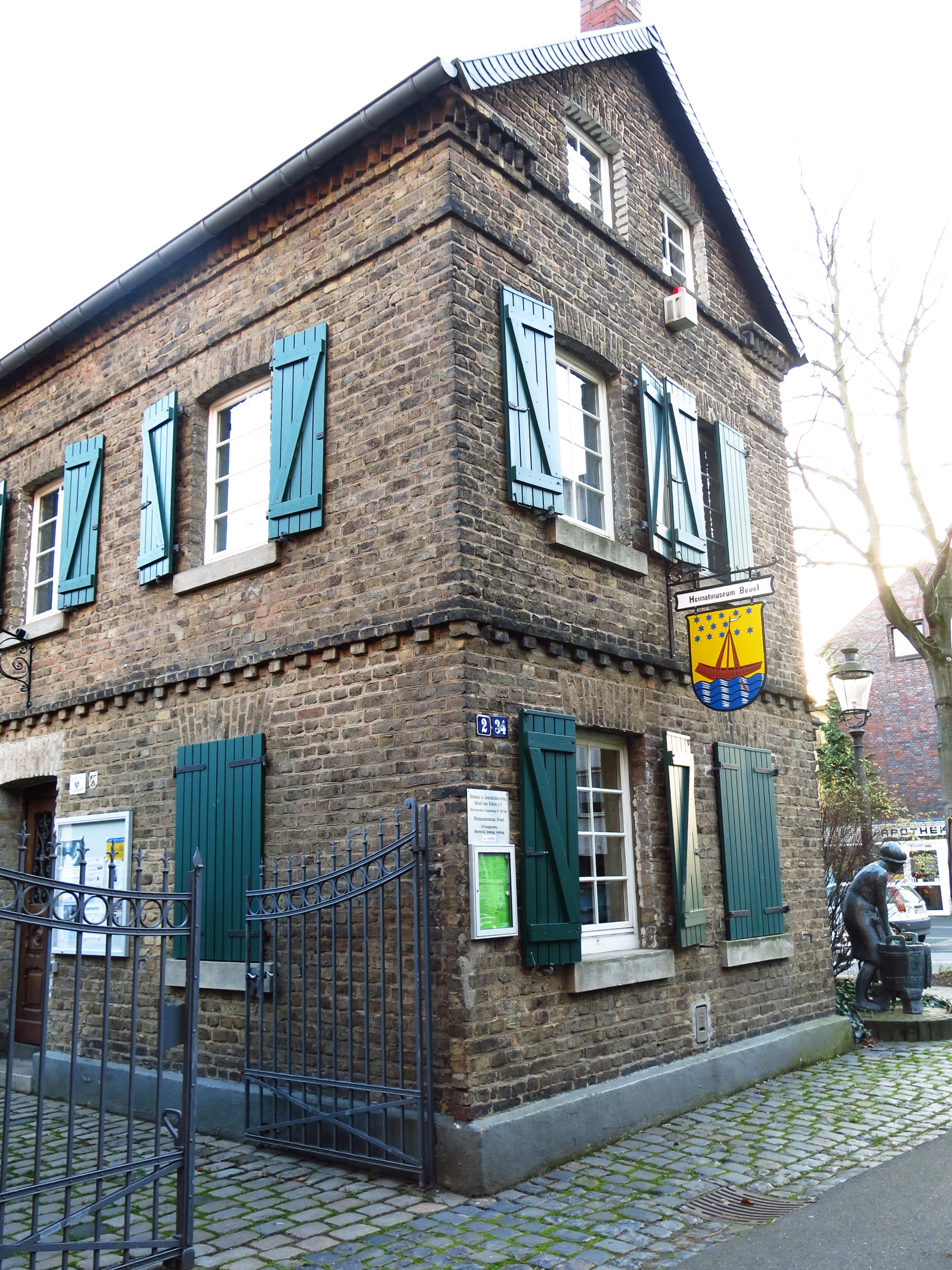 Heimatmuseum Beuel, Wagnergasse 2–4, Bonn-Beuel